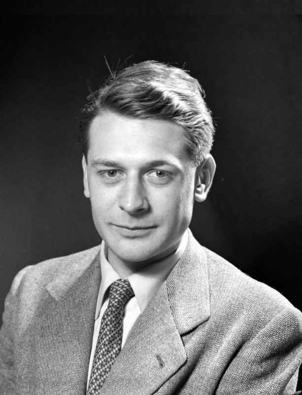 Porträt Wolfgang Kudrnofskys.